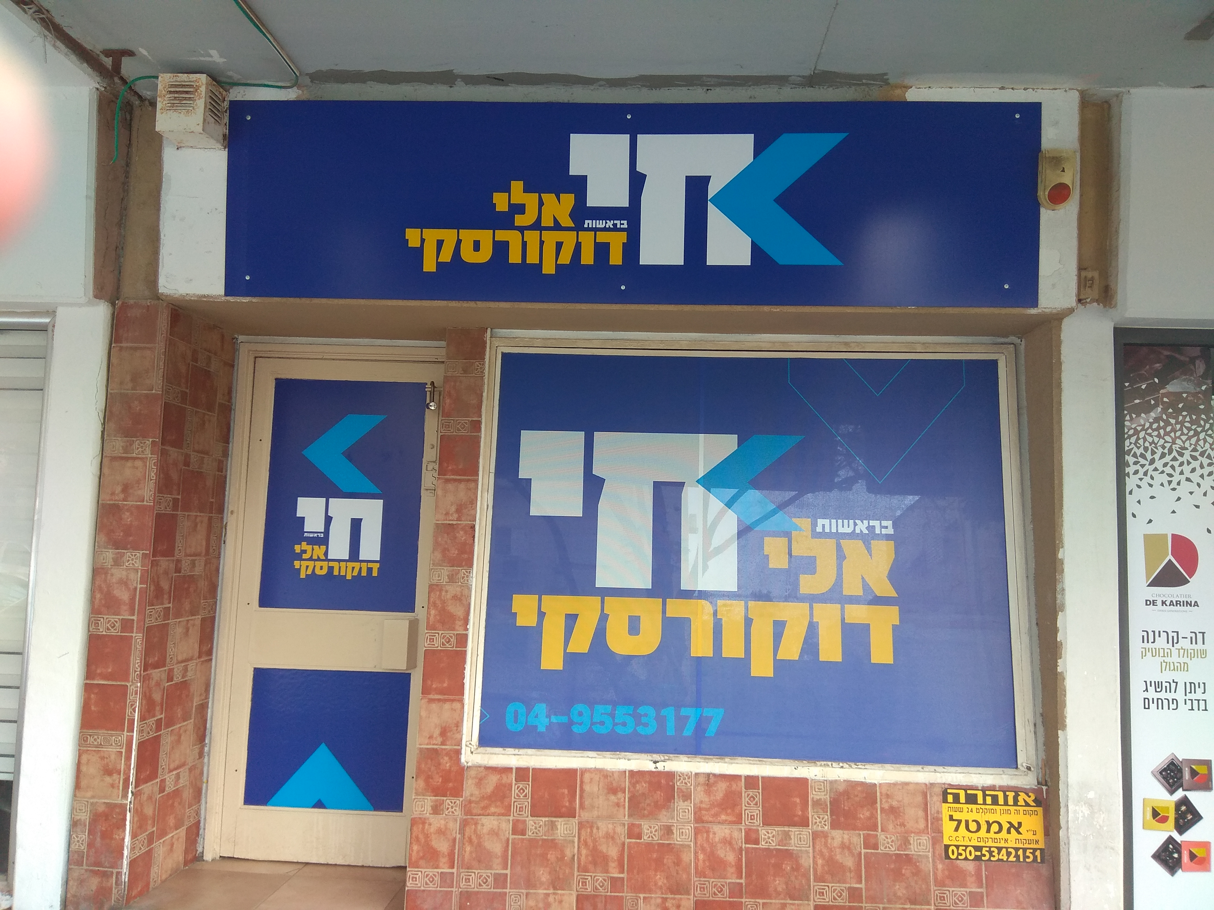 מטה הבחירות של אלי דוקורסקי